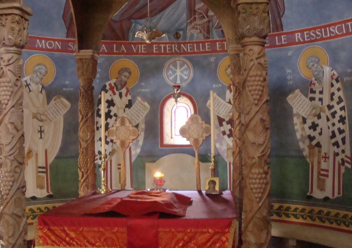 Le choeur de la chapelle Saint-Martin du monastère de la Dormition-de-la-Mère-de-Dieu, à La Faurie (Hautes-Alpes)